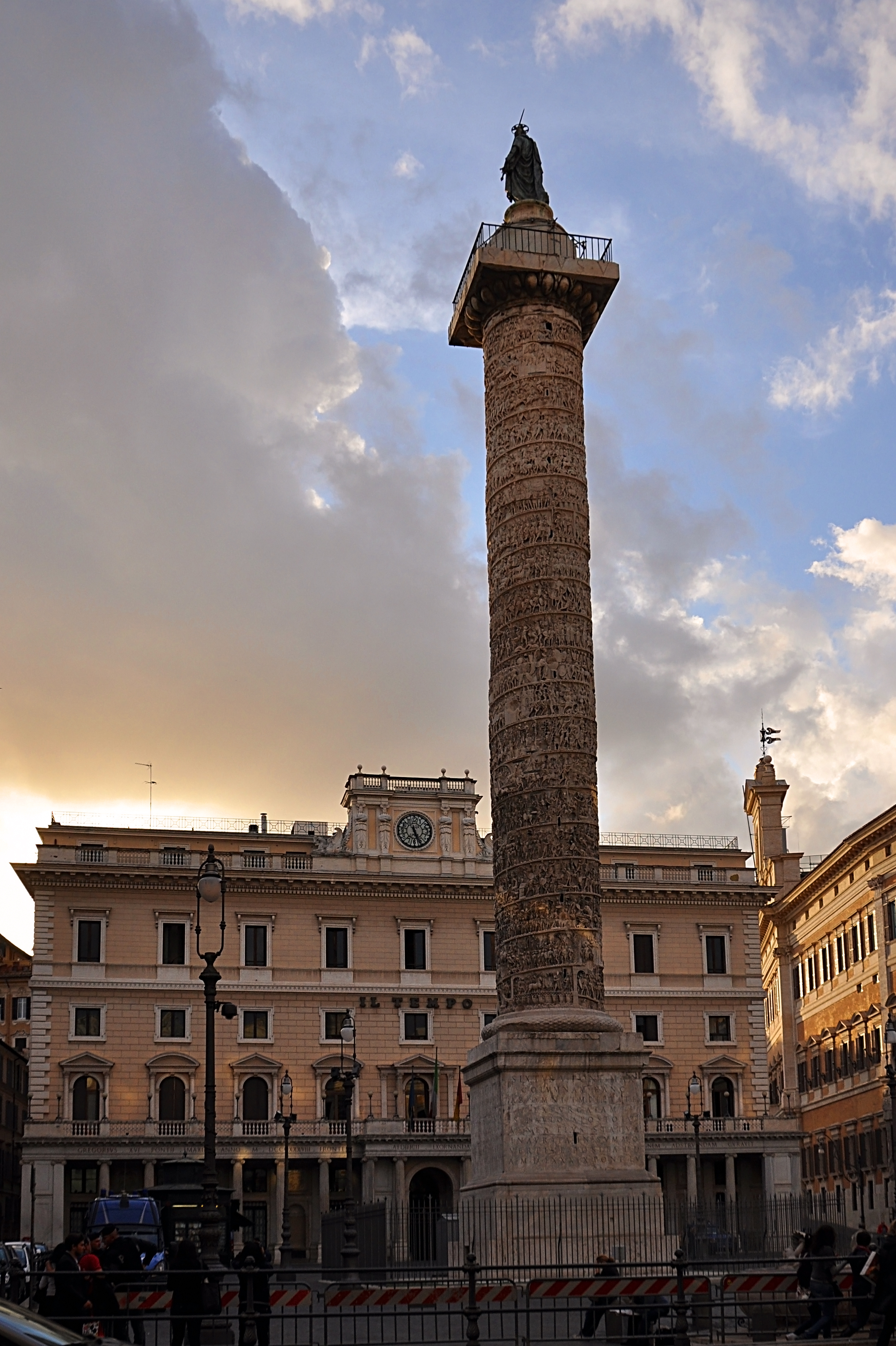 Piazza Colonna is a piazza in the historic heart of Rome, Italy. It is named for the marble Column of Marcus Aurelius which has stood there since 193 CE. The Palazzo Wedekind used to house the offices of the daily paper Il Tempo. I got it´s name when it was bought by the rich banker Karl Wedekind 1852.